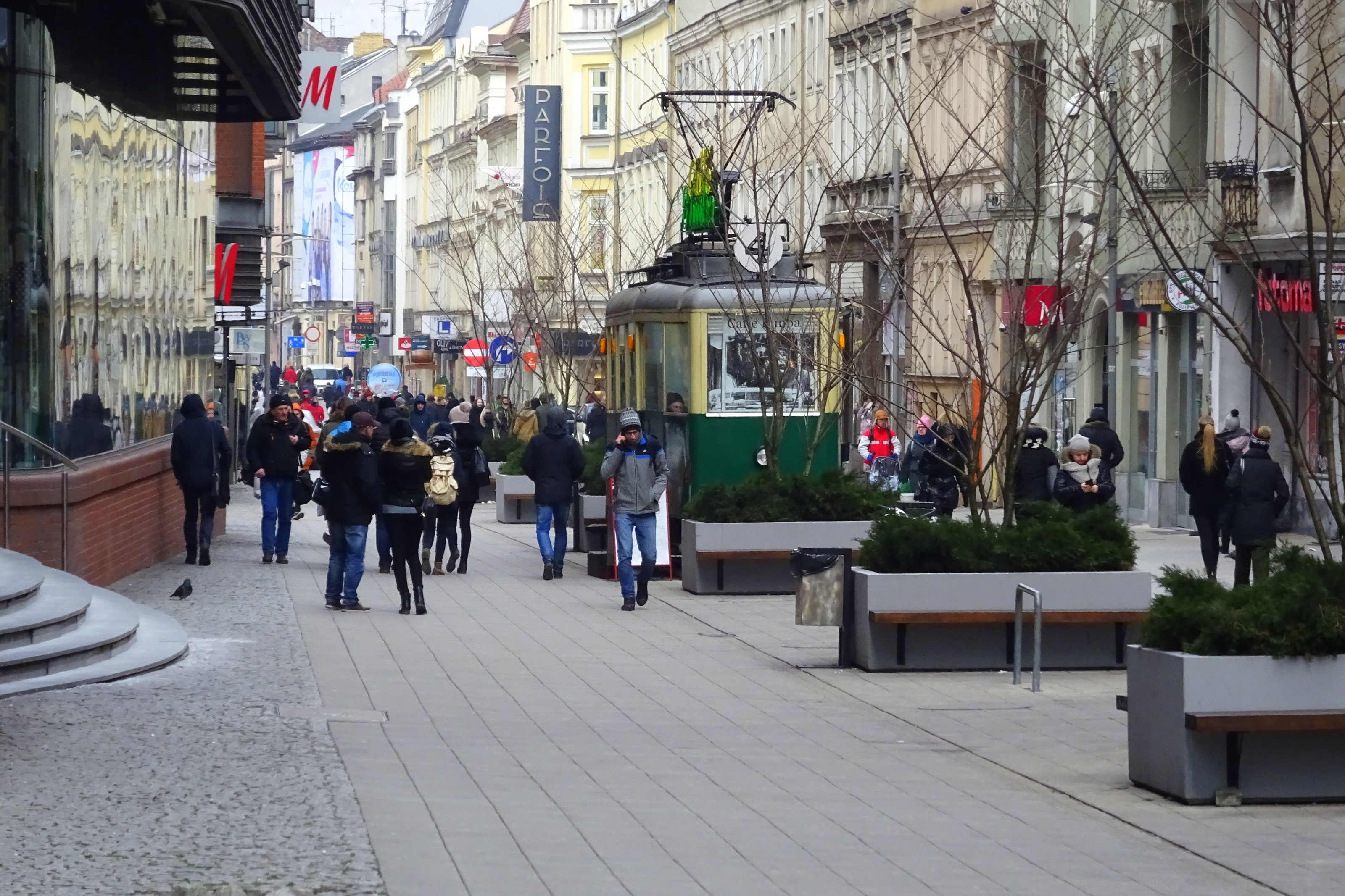 Poznań, ul. Półwiejska. Wagon tramwajowy zaadaptowano na kawiarnię